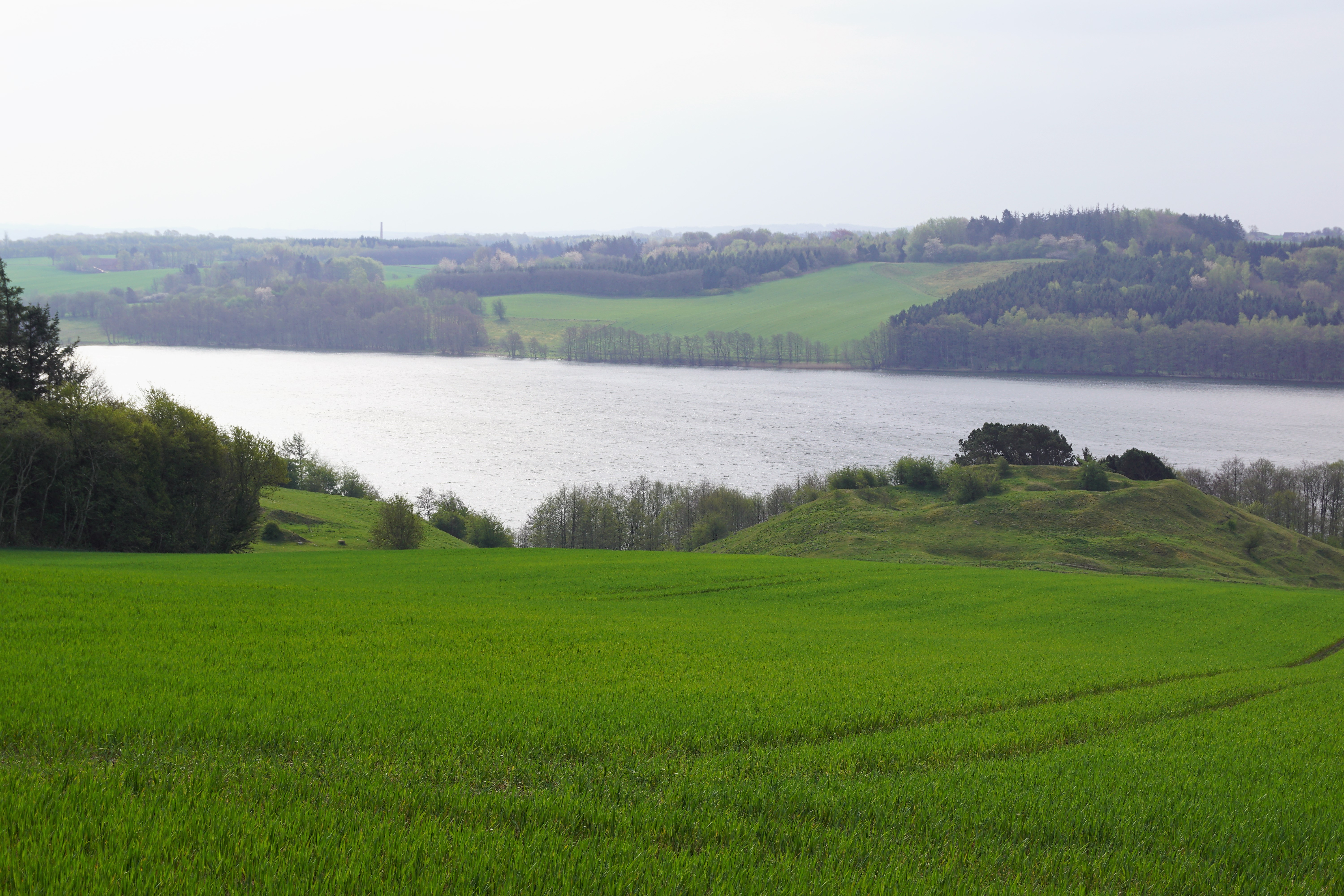 Fussing Sø vest for Randers